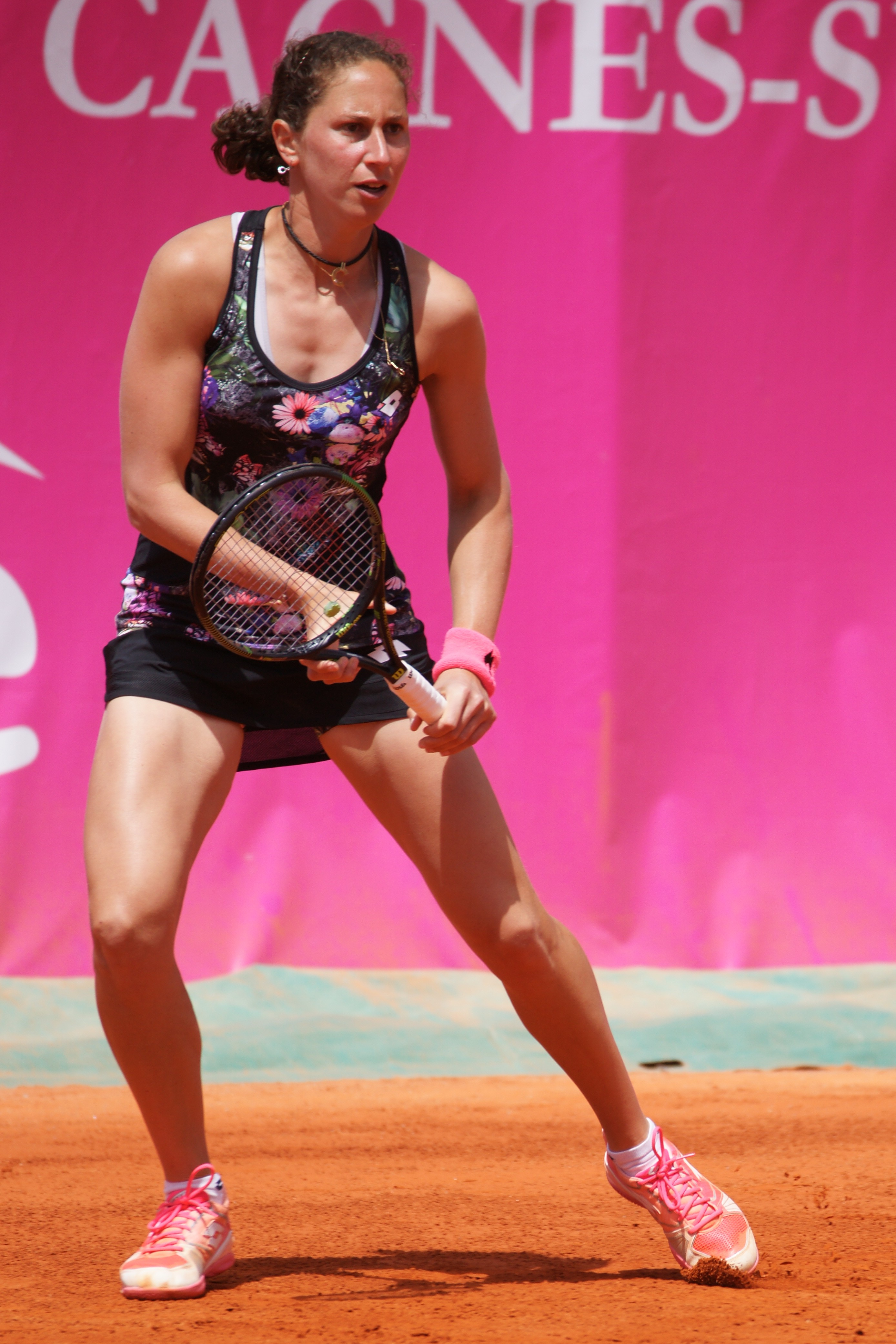 Claire Feuerstein Open ITF Cagnes 2016